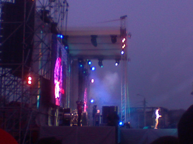 Відкриття третього сезону фонтану ROSHEN